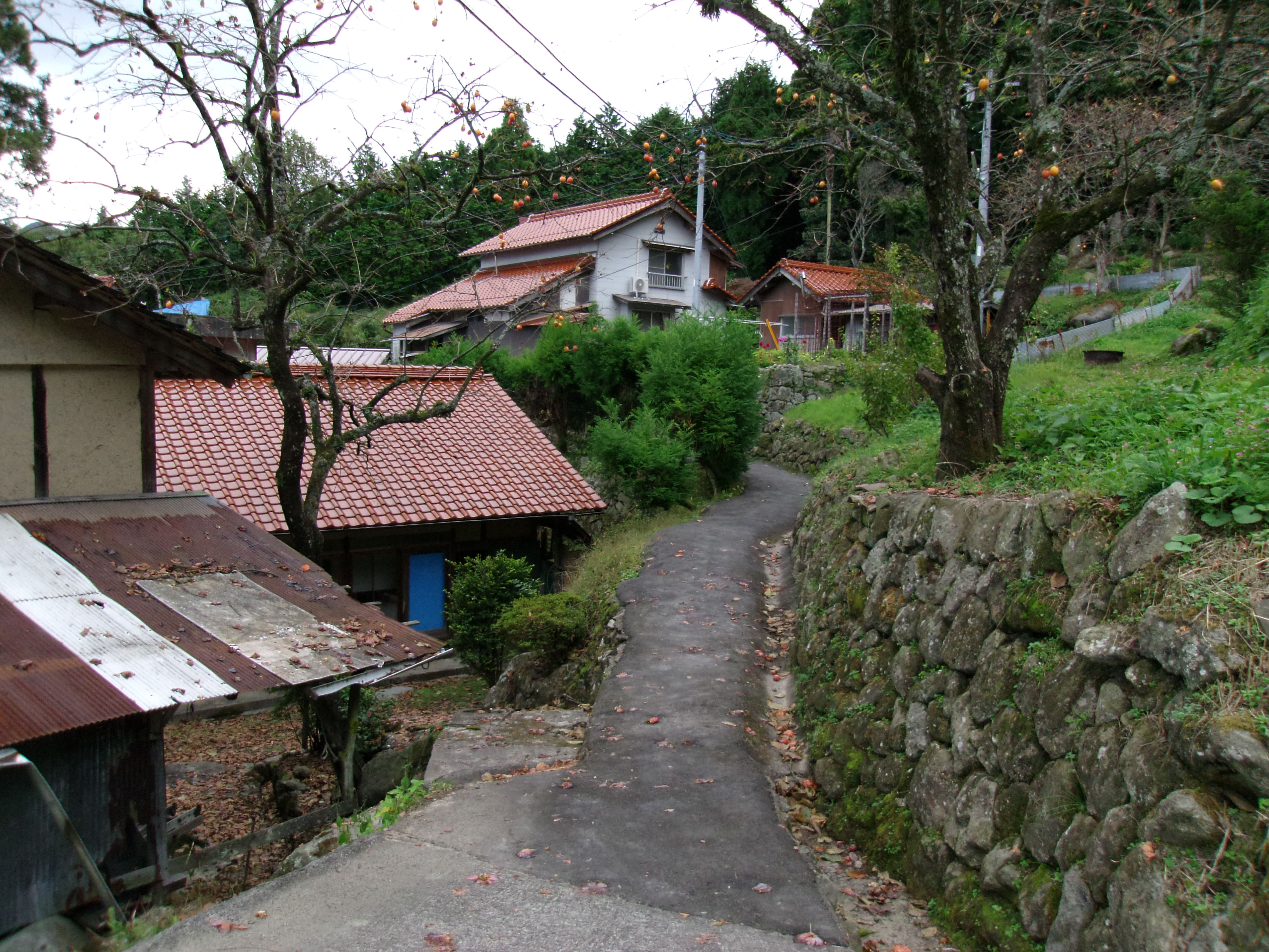 世界遺産「石見銀山」の構成資産である銀山街道温泉津沖泊道 清水集落